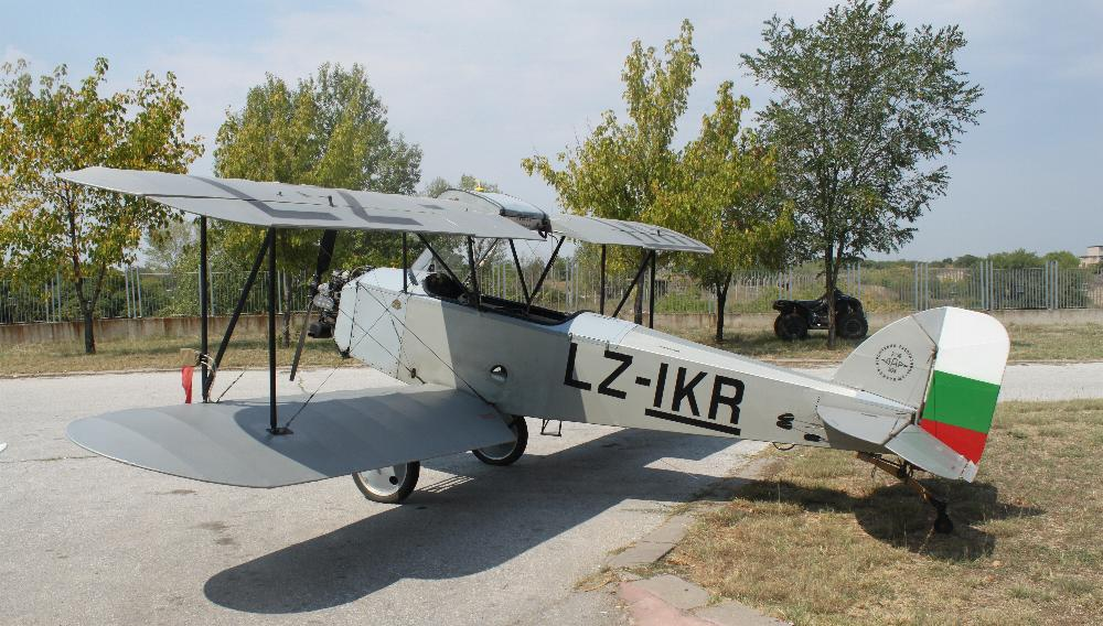 Darschavna Aeroplanna Rabotilniza, DAR-1, Rufzeichen LZ-IKR auf der BIAF Airshow 2011 in Plovdiv